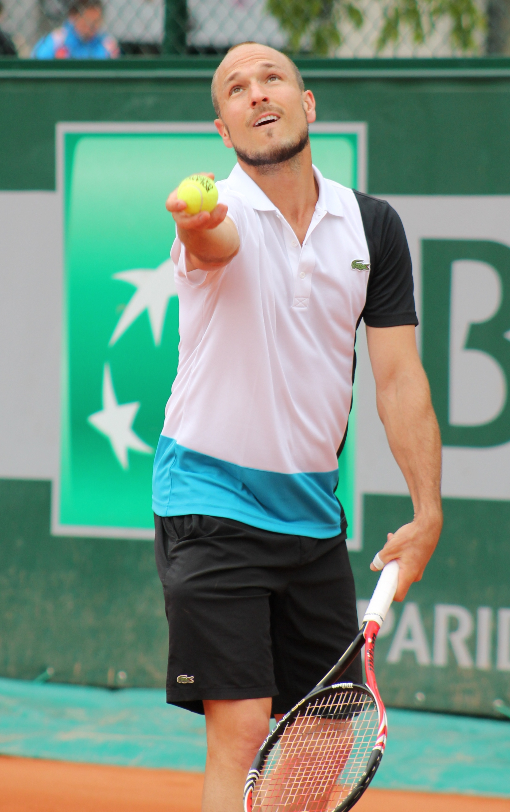 James Cerretani